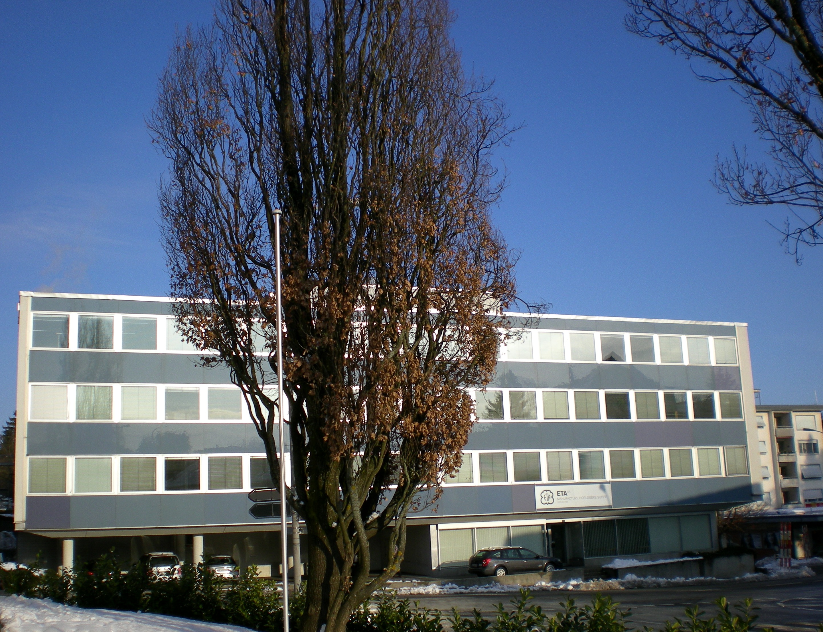 ETA Gebäude Grenchen Nord